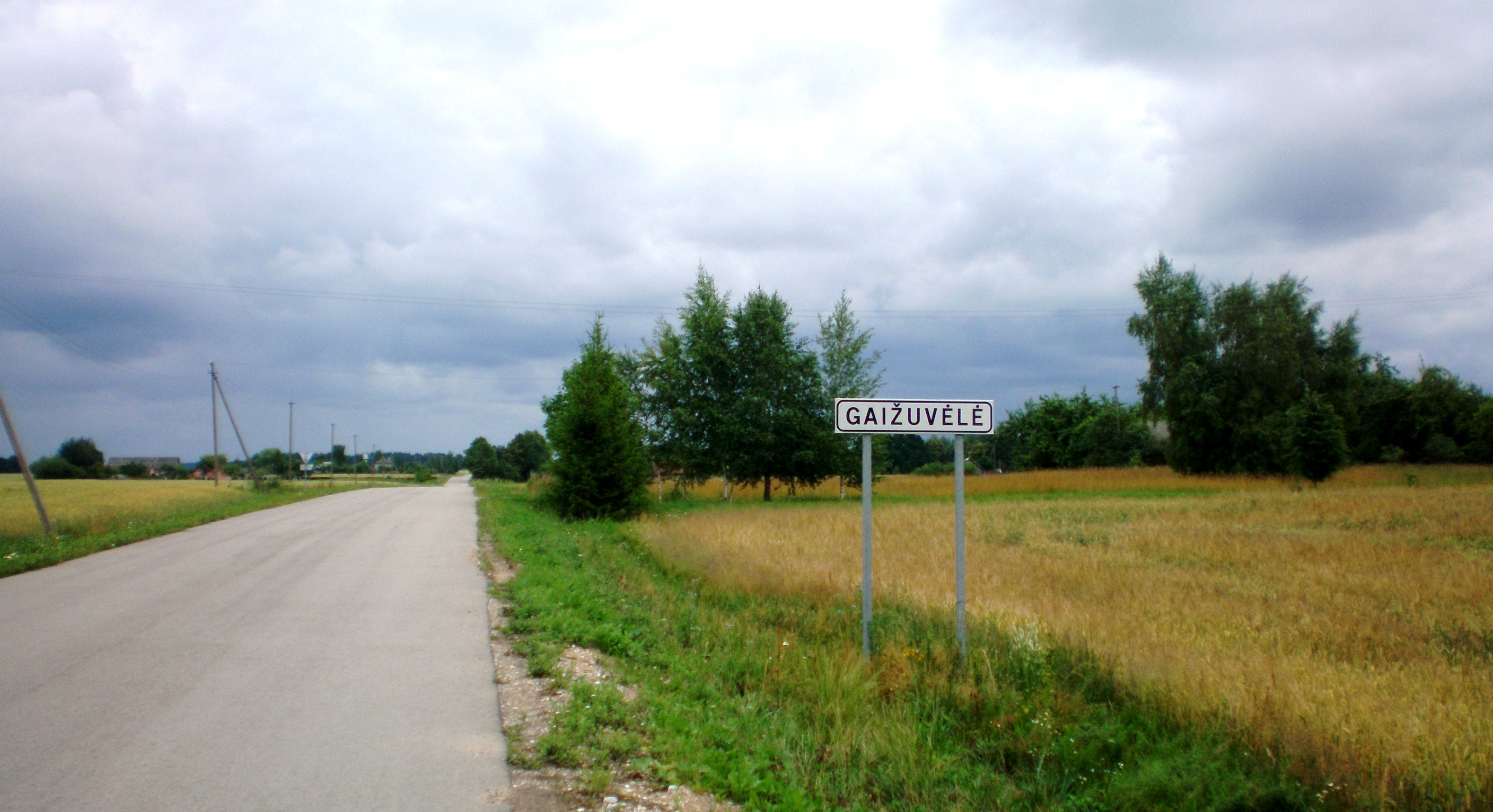 Gaižuvėlė, Kauno raj.